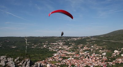 Parapente voando sobre Minde, após decolagem do alto da Serra dos Candeeiros.